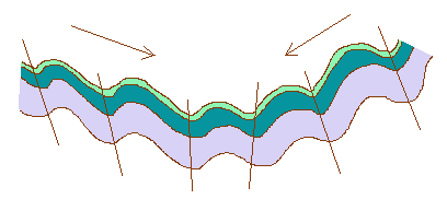 Schema eines geologischen Synklinoriums